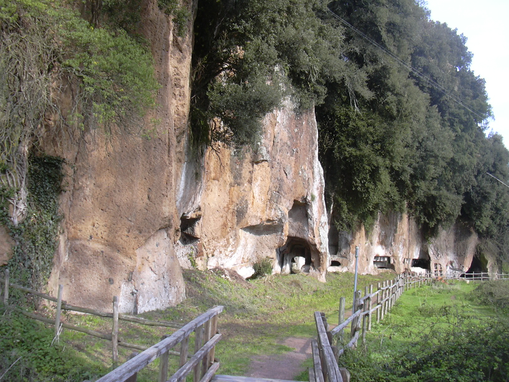 Sutri, Etruscan necropolis